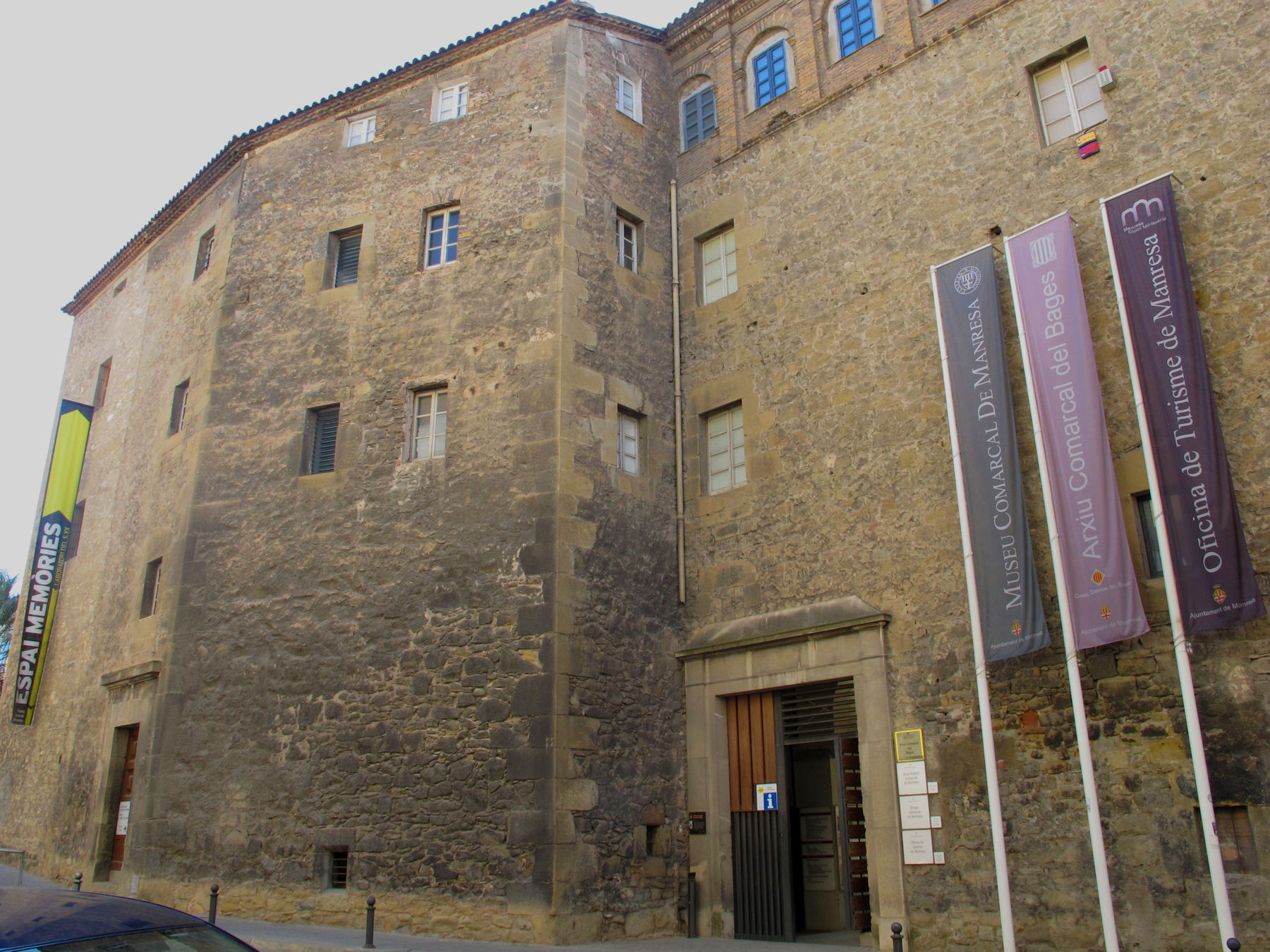 Antic col.legi de St. Ignasi, Manresa